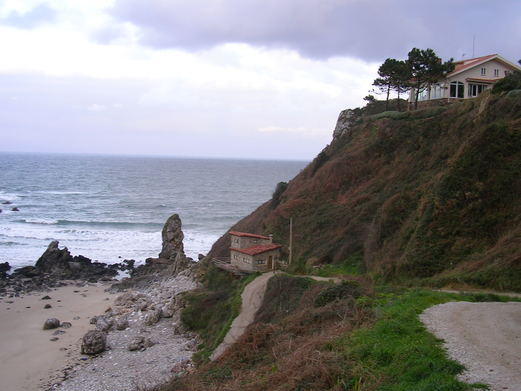 Playa de Amio y casas de Pechón, Cantabria